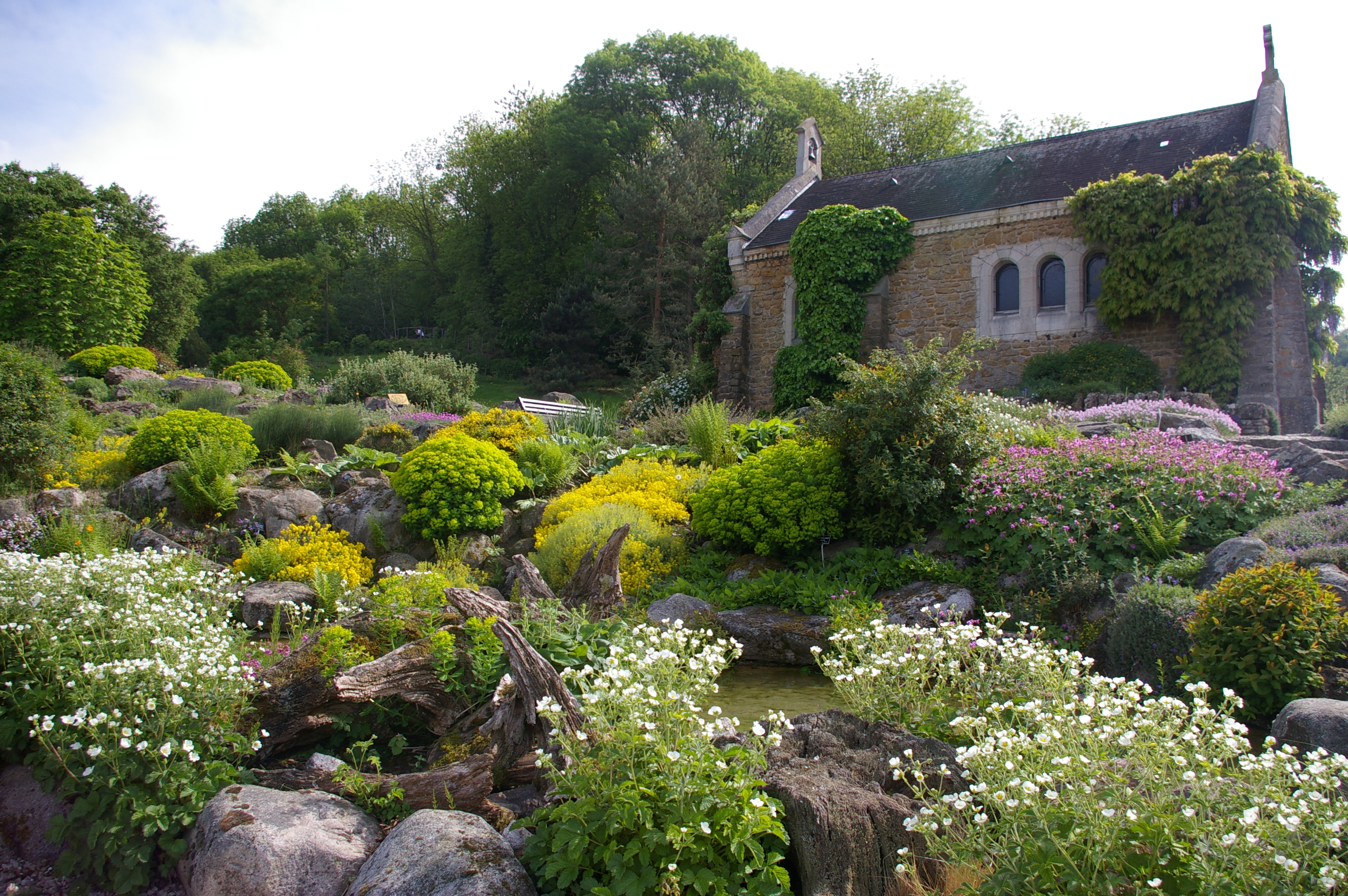 Alpinum. Chapelle Sainte-Valérie , érigée au XVIe s. en l'honneur de Valérie Geoffroy, soit par son père Jean Geoffroy, soit par son époux Antoine Champier (fils du médecin Symphorien Champier et filleul du duc Antoine de Lorraine). C'est une dépendance du château du Montet situé en lisière du jardin.